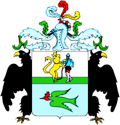 Coat of arms of Huanuco Peru